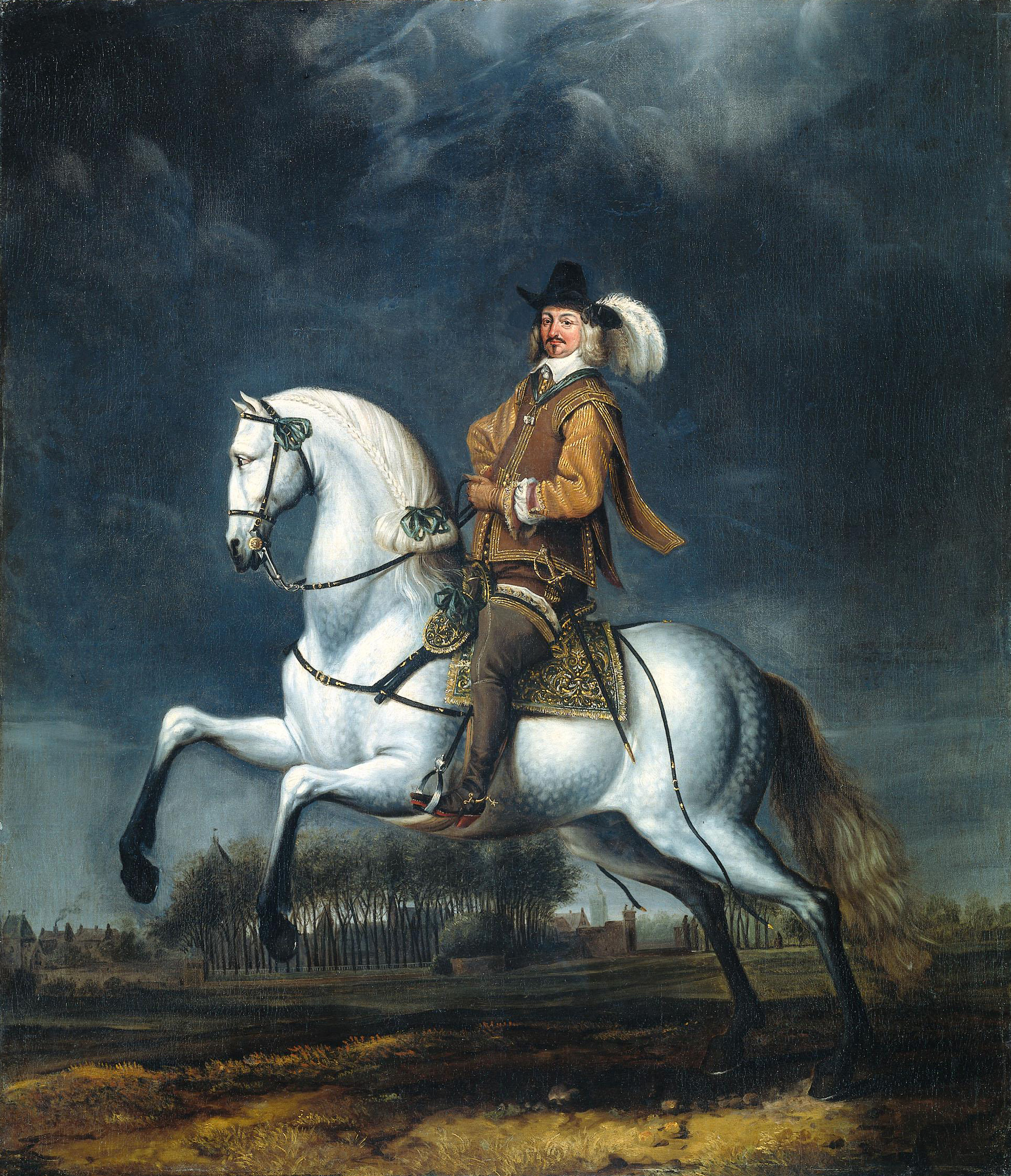 Johan Wolfert van Brederode, ruiterportret met Batestein in de achtergrond